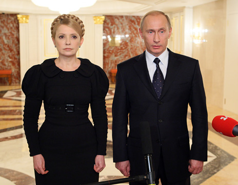 Заявление В.В.Путина и Премьер-министра Украины Ю.В.Тимошенко по итогам переговоров